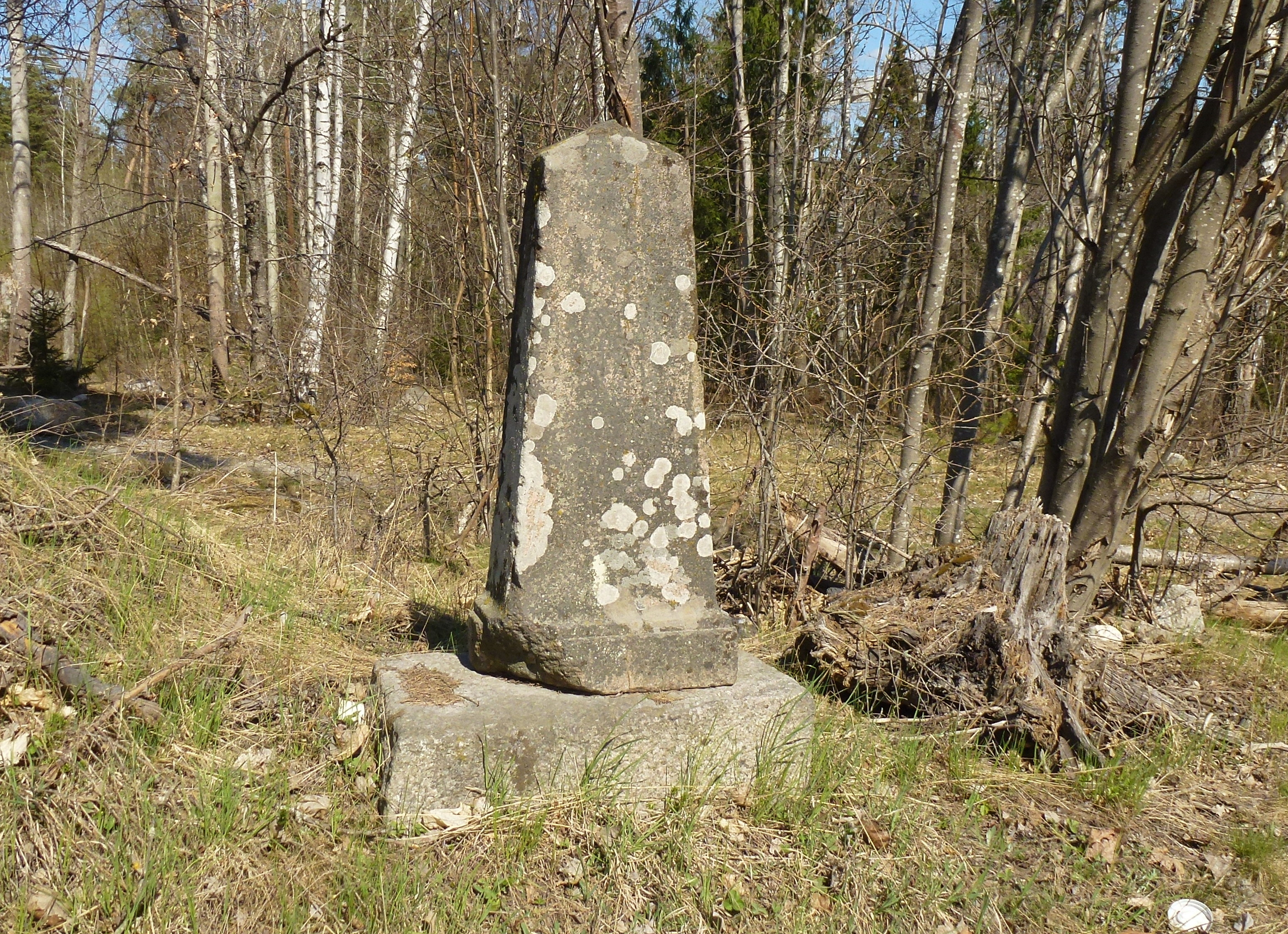 Milsten Kungsängen 2:1. Milstolpe av rödgrå granit i Stäket vid Stäksundet, Enköpingsvägen. Inskrift: "Almare Stäk 2 MIL från Stockholm 1805". Milstolpen står i vägkanten av Enköpingsvägen strax väster om bron över Stäketsundet på Upplands Bro-sidan.